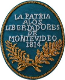 Escudo otorgado a las tropas del Ejército de las Provincias Unidas por la toma de Montevideo en 1814